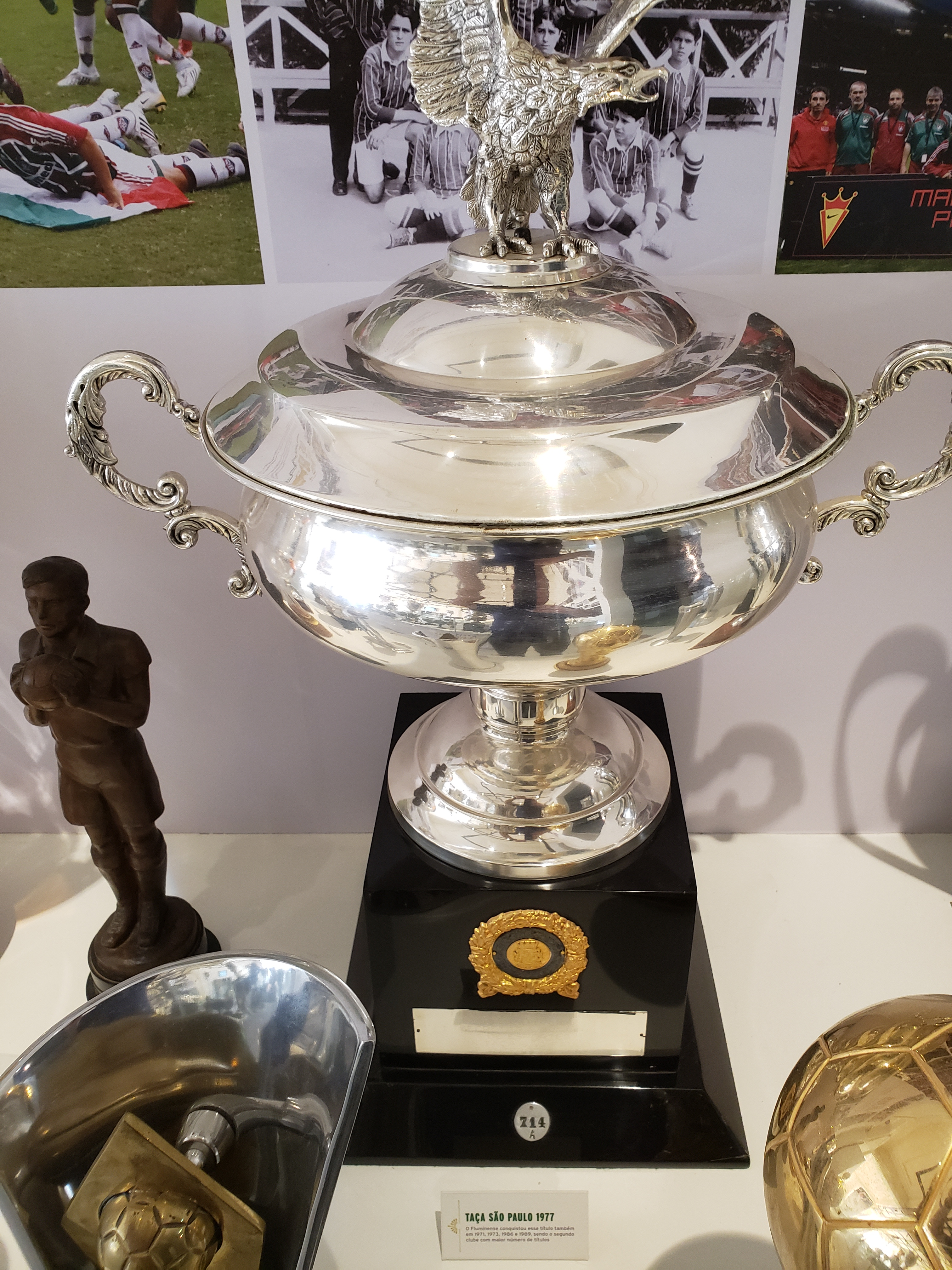 Copa São Paulo de futebol Júnior de 1977, conquistada pelo Fluminense Football Club.